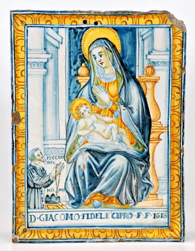 Targa raffigurante Madonna in trono con Bambino. Castelli XVII secolo